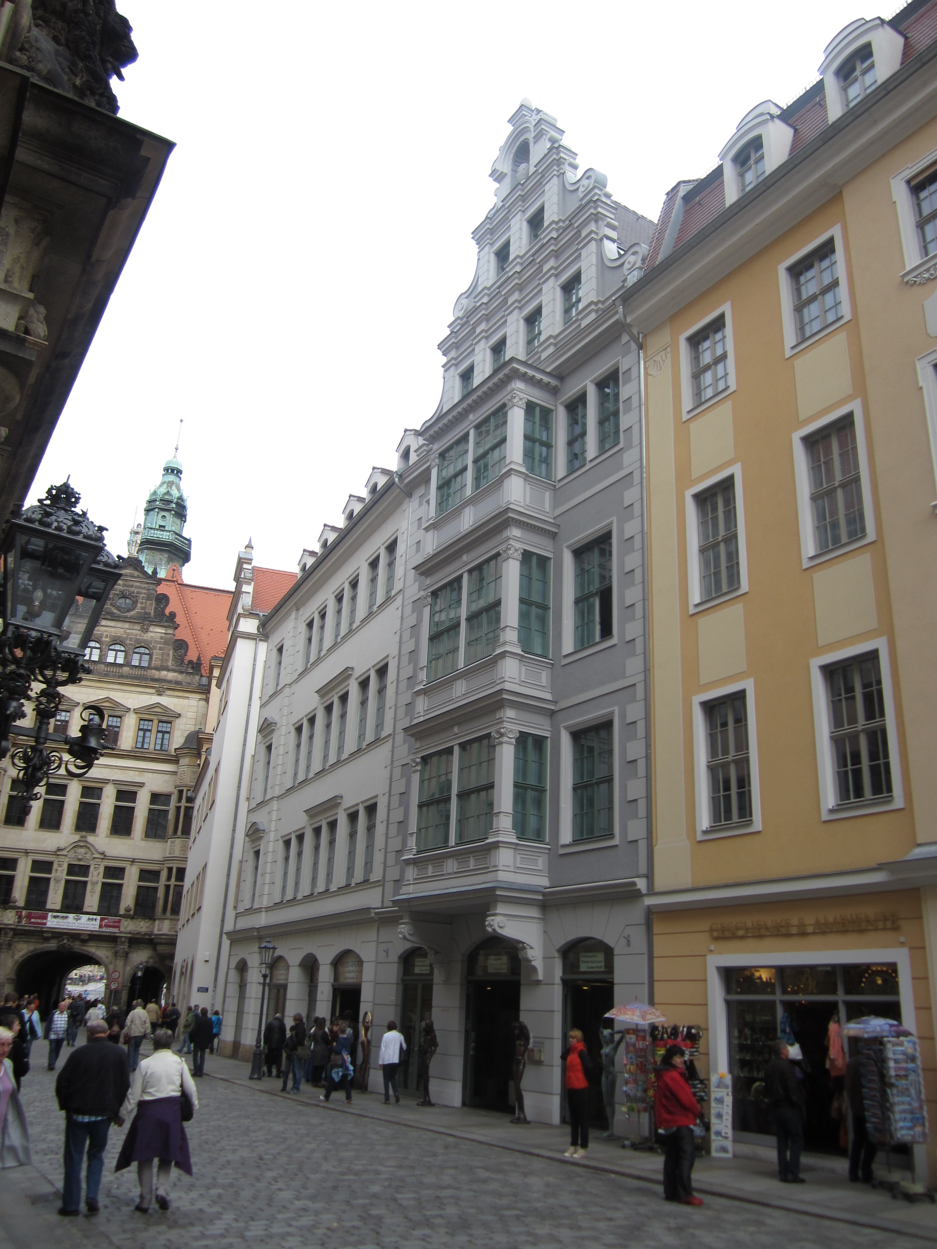 rekonstruierte Fassade des Zehmschen Hauses in der Schloßstraße in Dresden